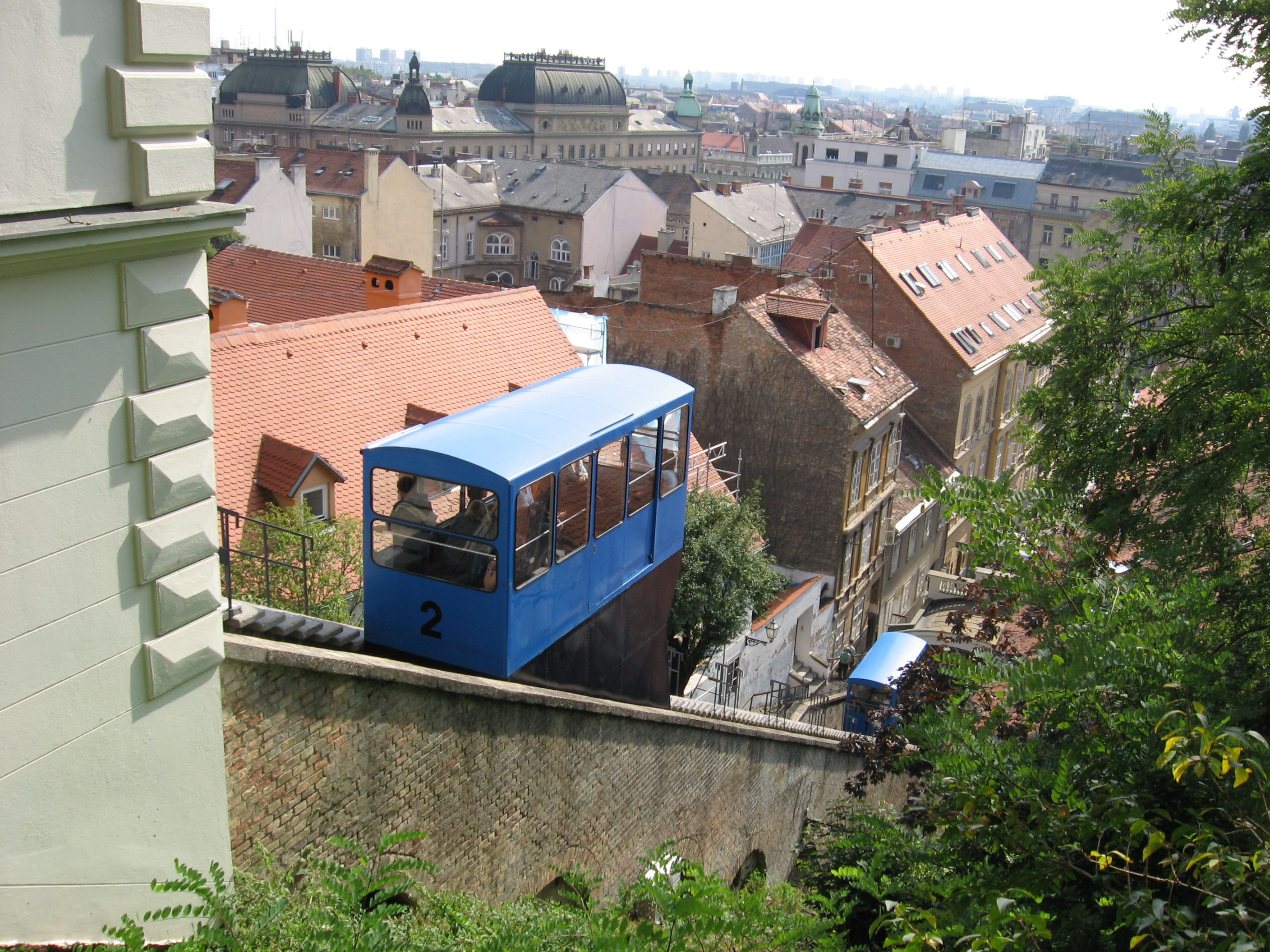 Uspinjača za Gornji grad.